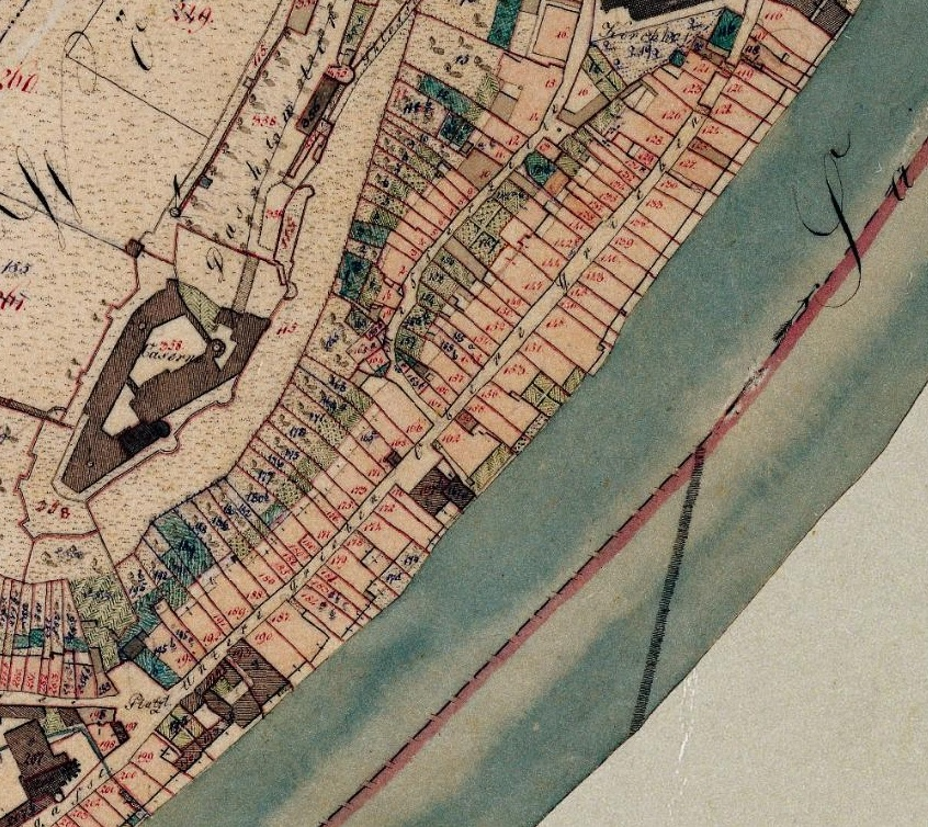 Historische Flurkarte der Burghauser Altstadt, u. a. die Straße In den Grüben